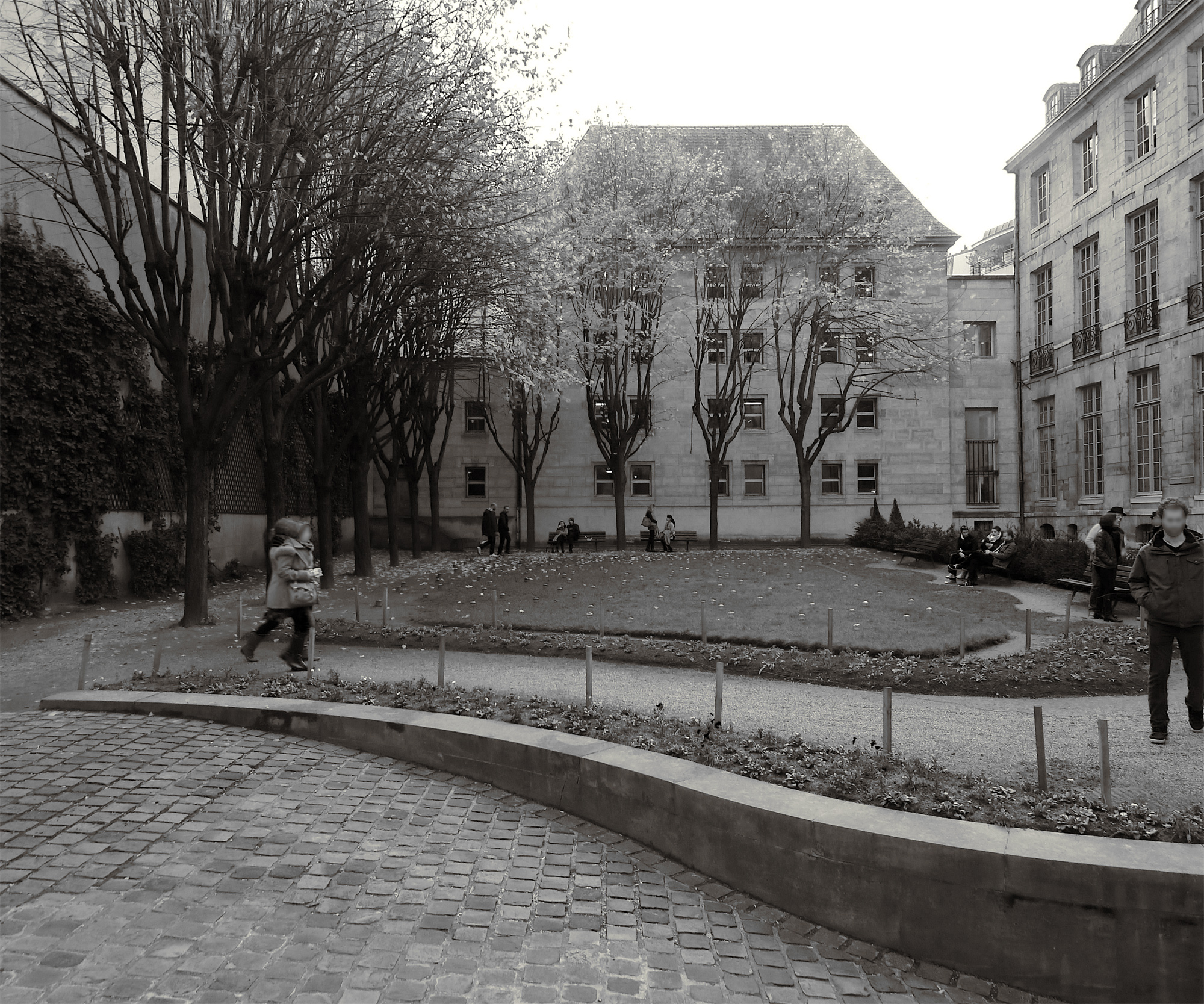 Jardin de l'Hôtel-Lamoignon - Mark-Ashton, Paris IV